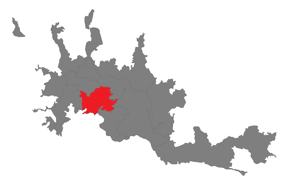 mapa comuna la fuente de manizales